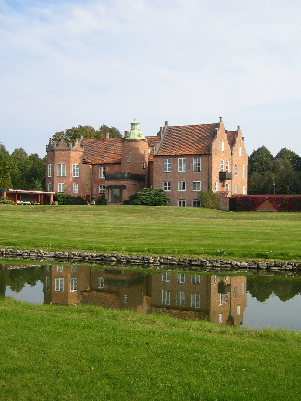 Råbelövs slott. Bilden tagen av mig själv 9 oktober 2005.